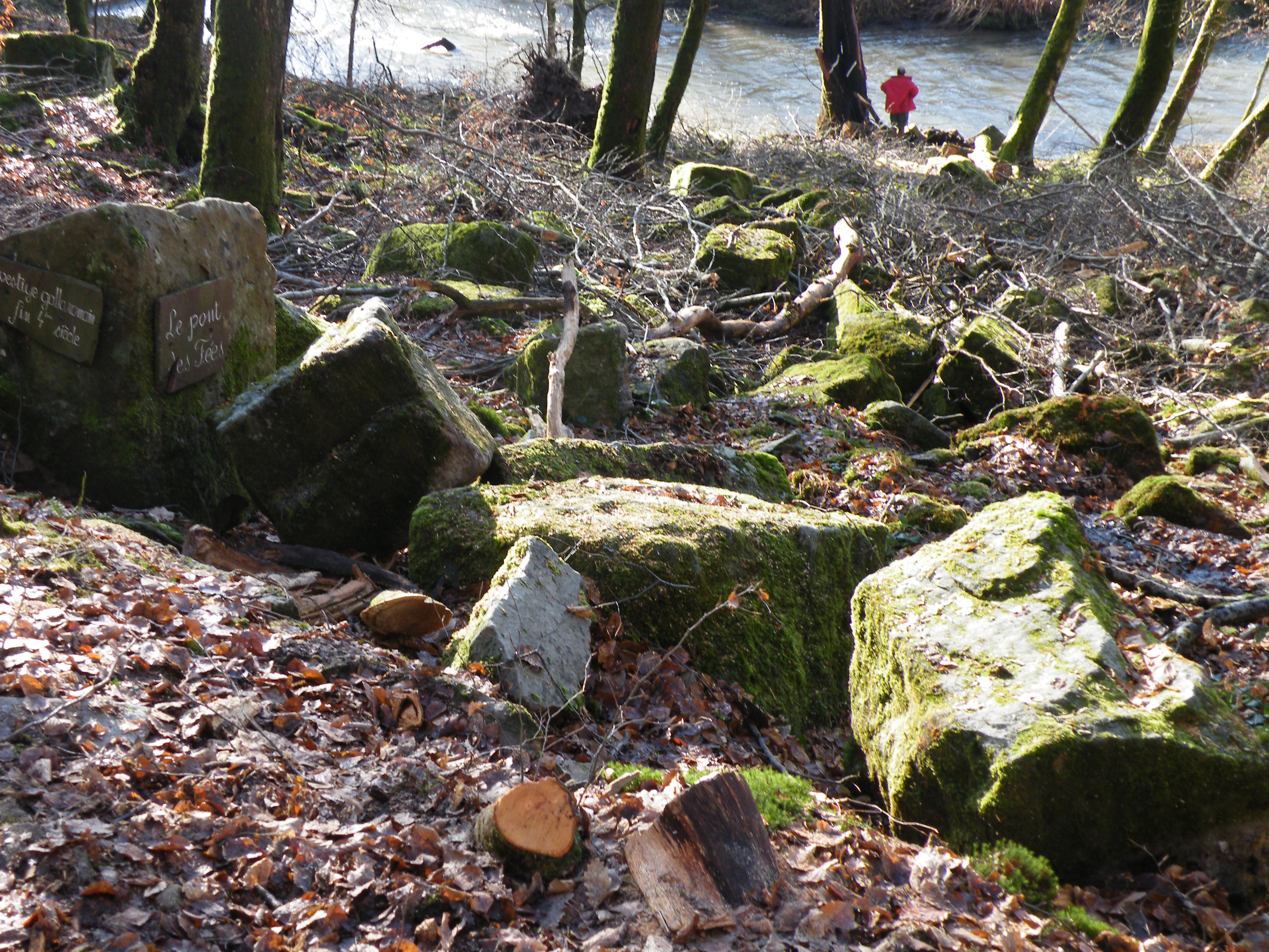 vestiges galloromains pont dit Pont des Fées, Les voivres, Vosges